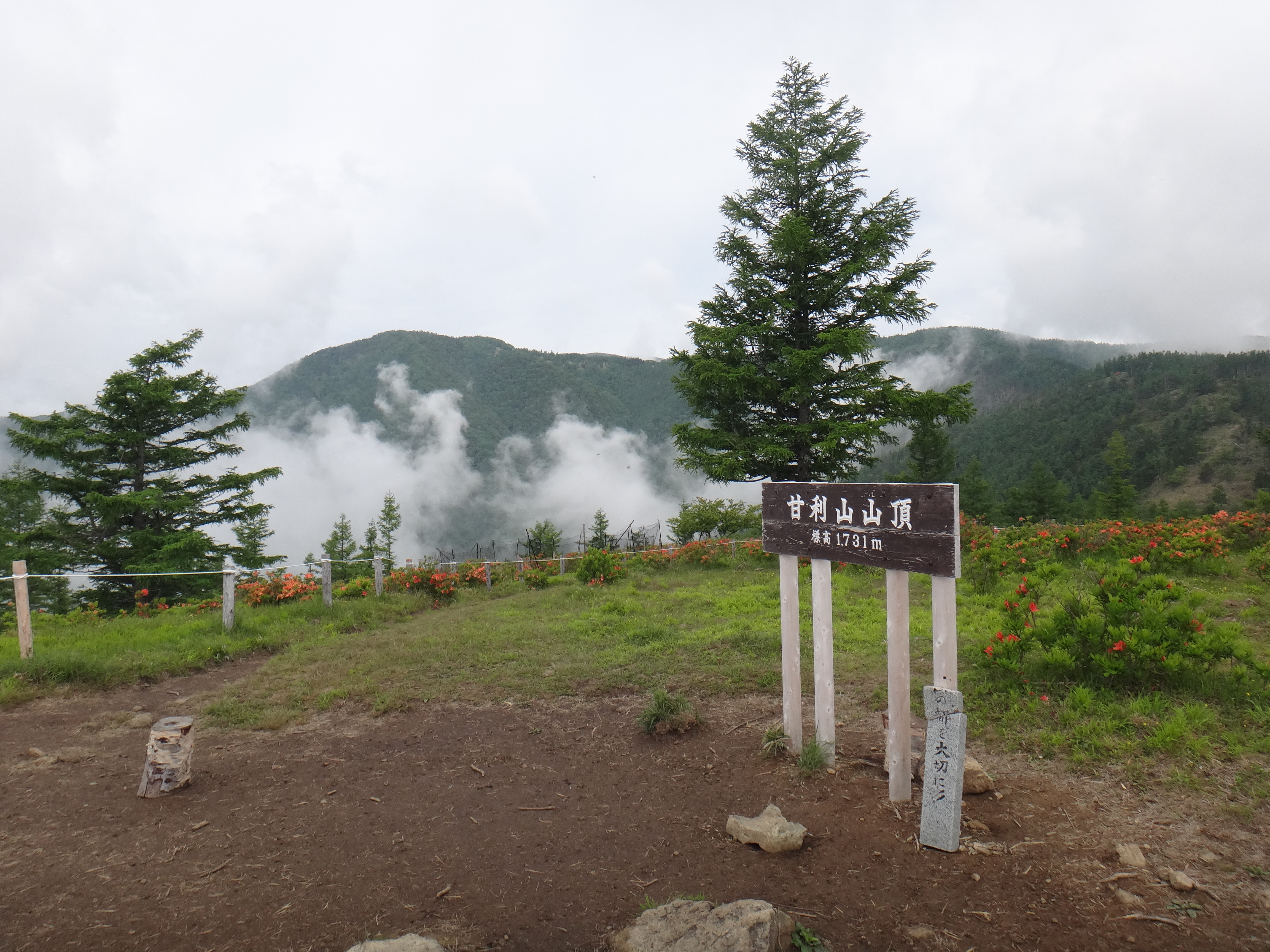 レンゲツツジの咲き誇る甘利山山頂から千頭星山を眺める